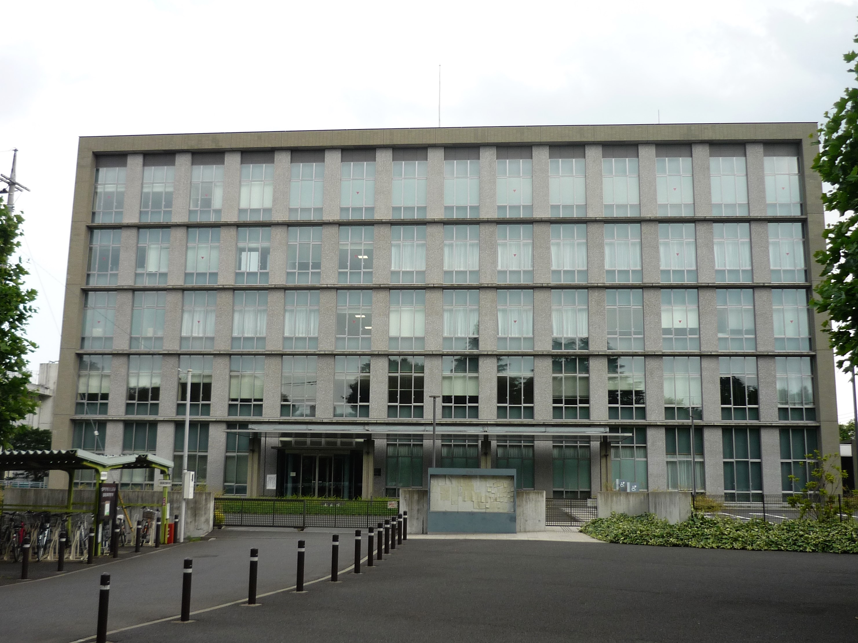 松戸簡易裁判所・千葉地方裁判所松戸支部・千葉家庭裁判所松戸支部